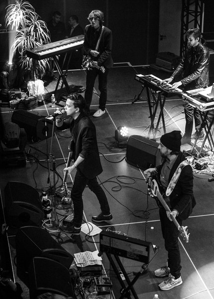 Secret Avenue у київському клубі Sentrum у грудні 2014 року.